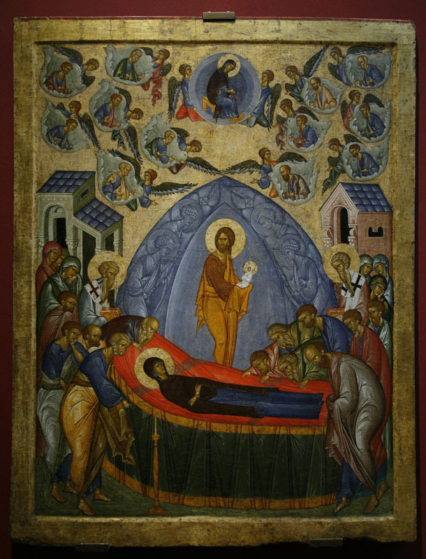 Икона «Успение Пресвятой Богородицы». 2-я половина XV века. Тверская школа. Особо значительные фигуры Христа и Богоматери композиционно выделены: они больше других фигур, их одежды написаны самыми плотными, самыми глубокими цветами в иконе: коричневым и синим. Они имеют особое цветовое окружение, насыщенное по тону и символическое по значению. Фигура Христа окружена голубой мандалой, обозначающей Его божественность, принадлежность небесному миру. Фигура Марии распростерта на ложе цвета киновари. Через контраст голубого и киновари, через торжество голубого утверждается мысль о всемогуществе божественного, о власти небесного над земным (среди исследователей древнерусского искусства эту икону принято называть «Голубым Успением»). Вся сцена построена в сложном ритмическом движении, направленном к центру иконы. Дальние фигуры стоят прямо, только склонив головы. Чем ближе фигуры расположены к ложу, тем сильнее их склонение; стоящие впереди других апостолы припадают к ложу, возложив на него руки. Но ни один из них не приближен к Марии. Она изображена в некоей духовной и пространственной обособленности. Напряженный ритм композиции, вдохновенные лица предстоящих, устремленные на Богоматерь взгляды раскрывают внутренний смысл изображенного – скорбь прощания, сокровенное желание участников сцены ощутить чудо приобщения Богоматери вечности. Через композицию раскрывается основная тема иконы — соотношение небесного и земного, божественного и человеческого.